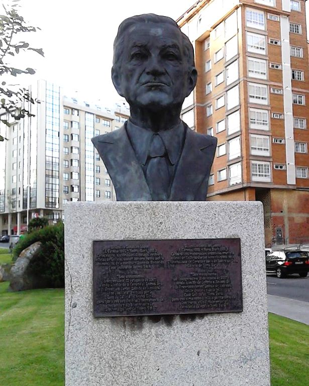 Busto de Emilio González López.